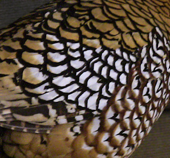 Detail Vederkleed